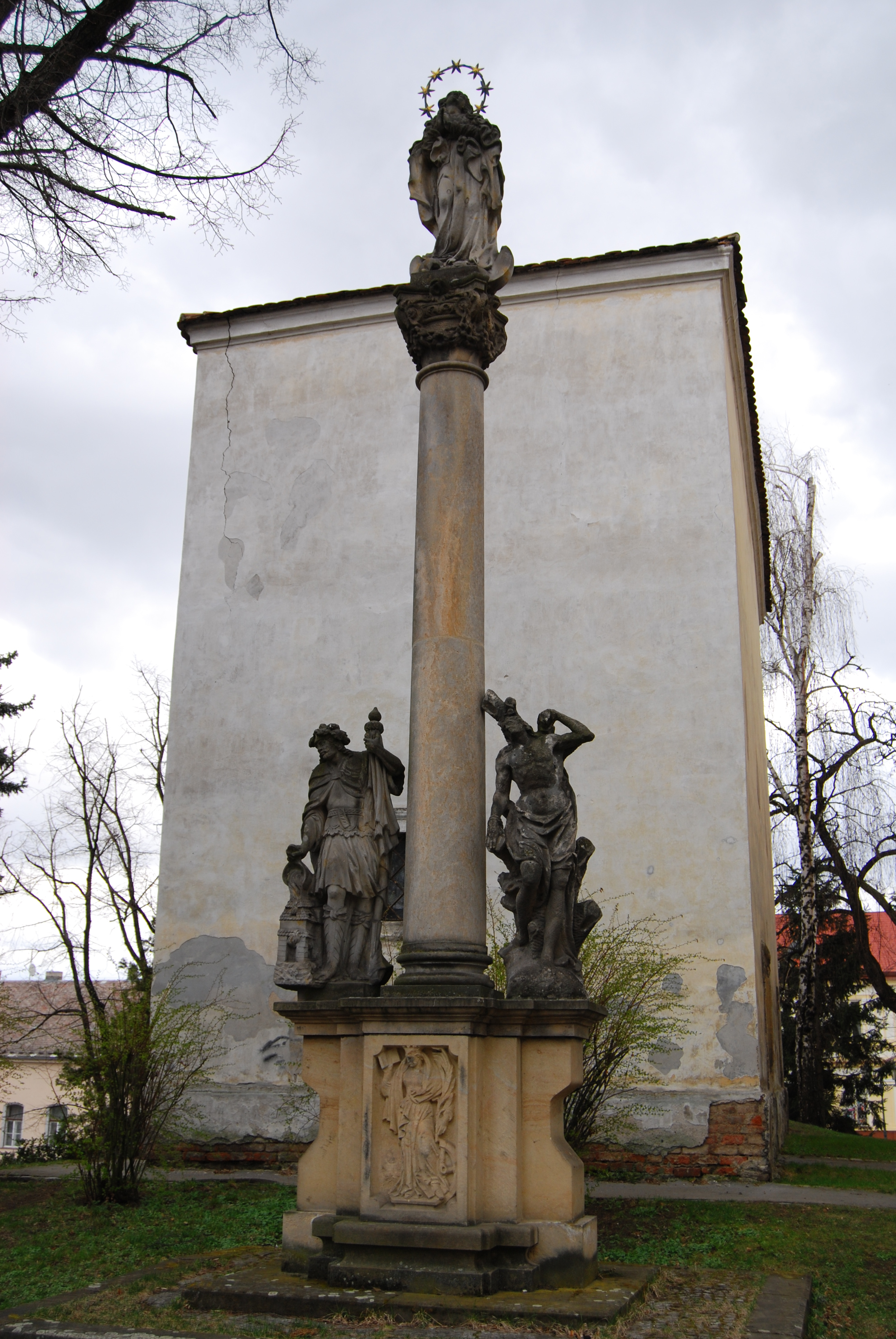 Morový sloup poblíž kostela v Hořovicích na náměstí naproti radnici. Hořovice. Okres Beroun. Česká republika.